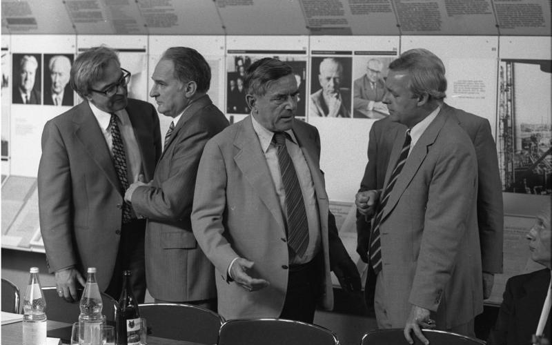 Wissenschaftliche Tagung der Stiftung "Konrad-Adenauer-Haus" im Konrad-Adenauer-Haus, Rhöndorf